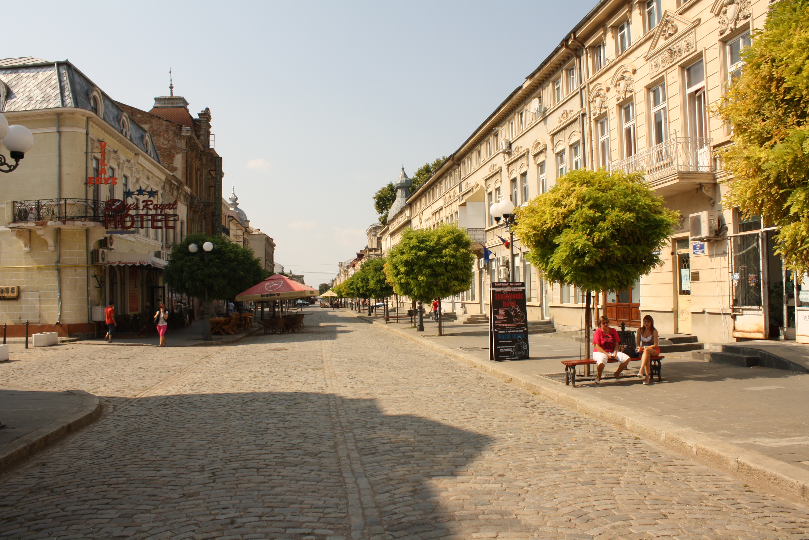 Centrul istoric al municipiului Brăila - str. Mihai Eminescu